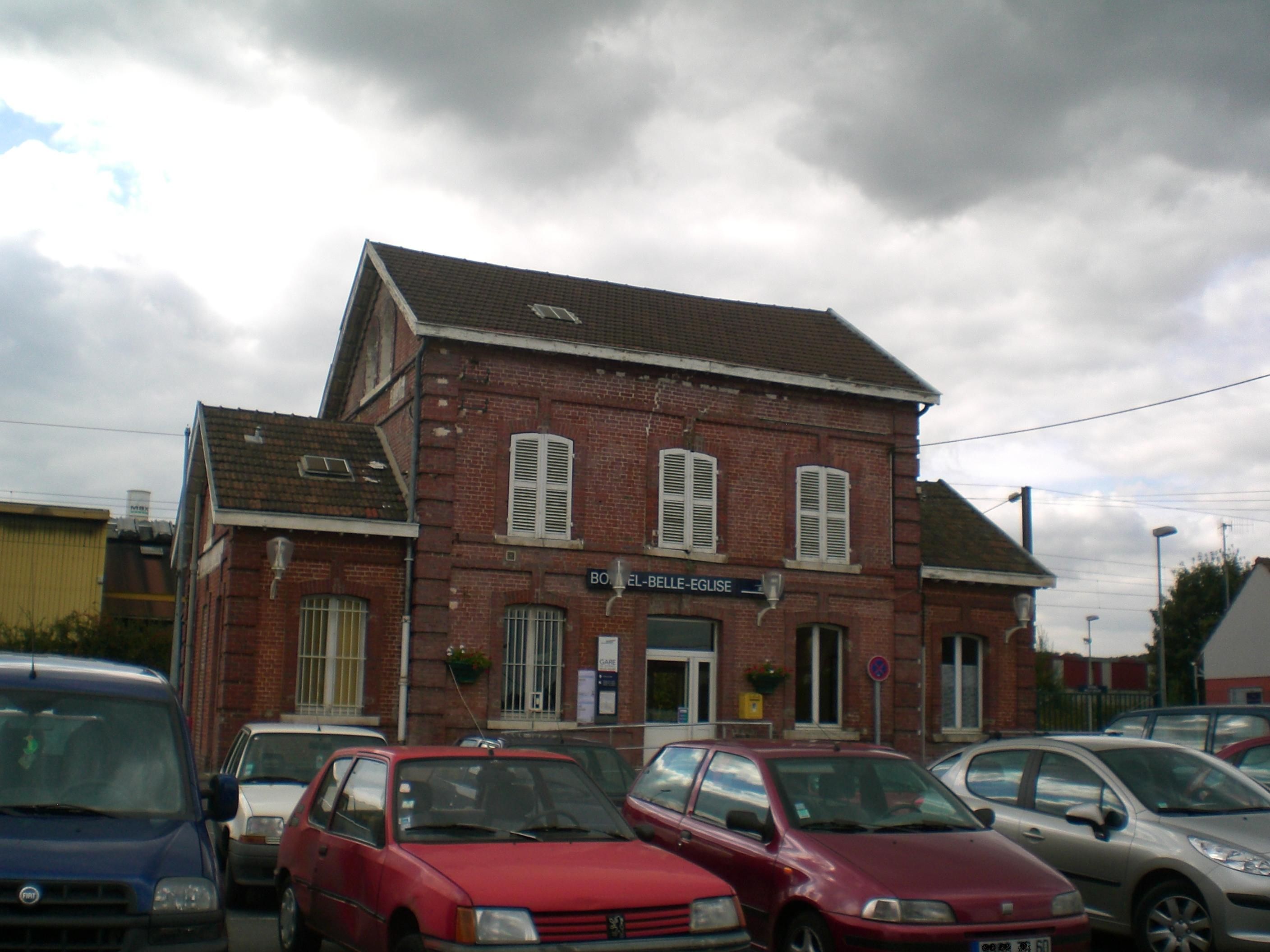 Gare de Bornel-Belle-Église - Oise France